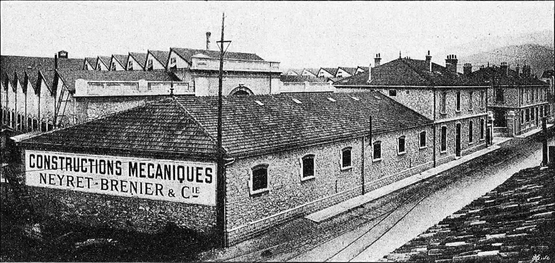 Usine Neyret-Brenier en 1904 le long de l'actuelle avenue Ambroise-Croizat à Saint-Martin-d'Hères. Les deux bâtiments au premier plan, encadrant l'entrée de l'usine, sont aujourd'hui devenus la Maison communale (mairie).